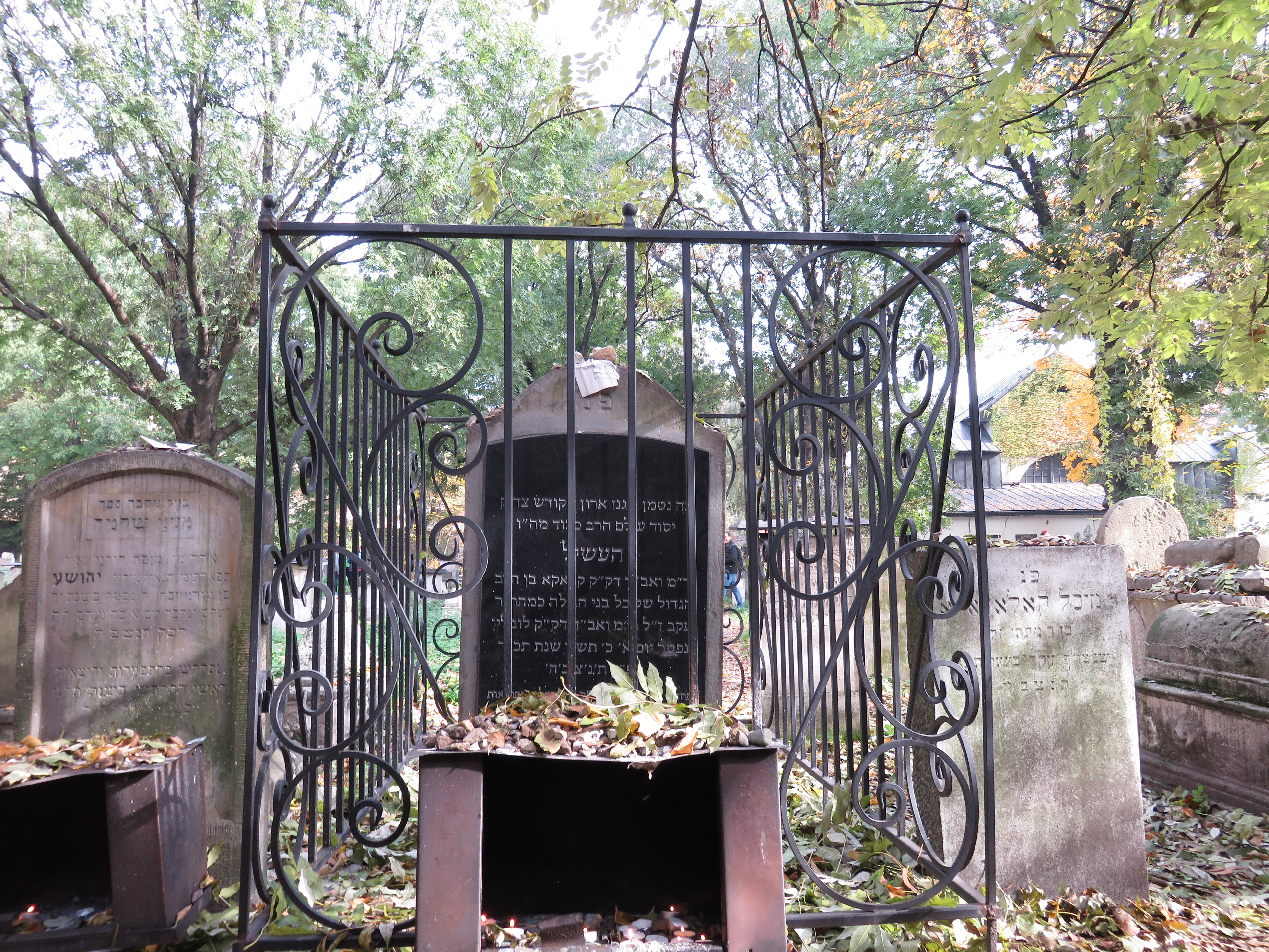 מצבת רבי השיל מקראקא. בית הקברות היהודי העתיק בקרקוב (5).jpg